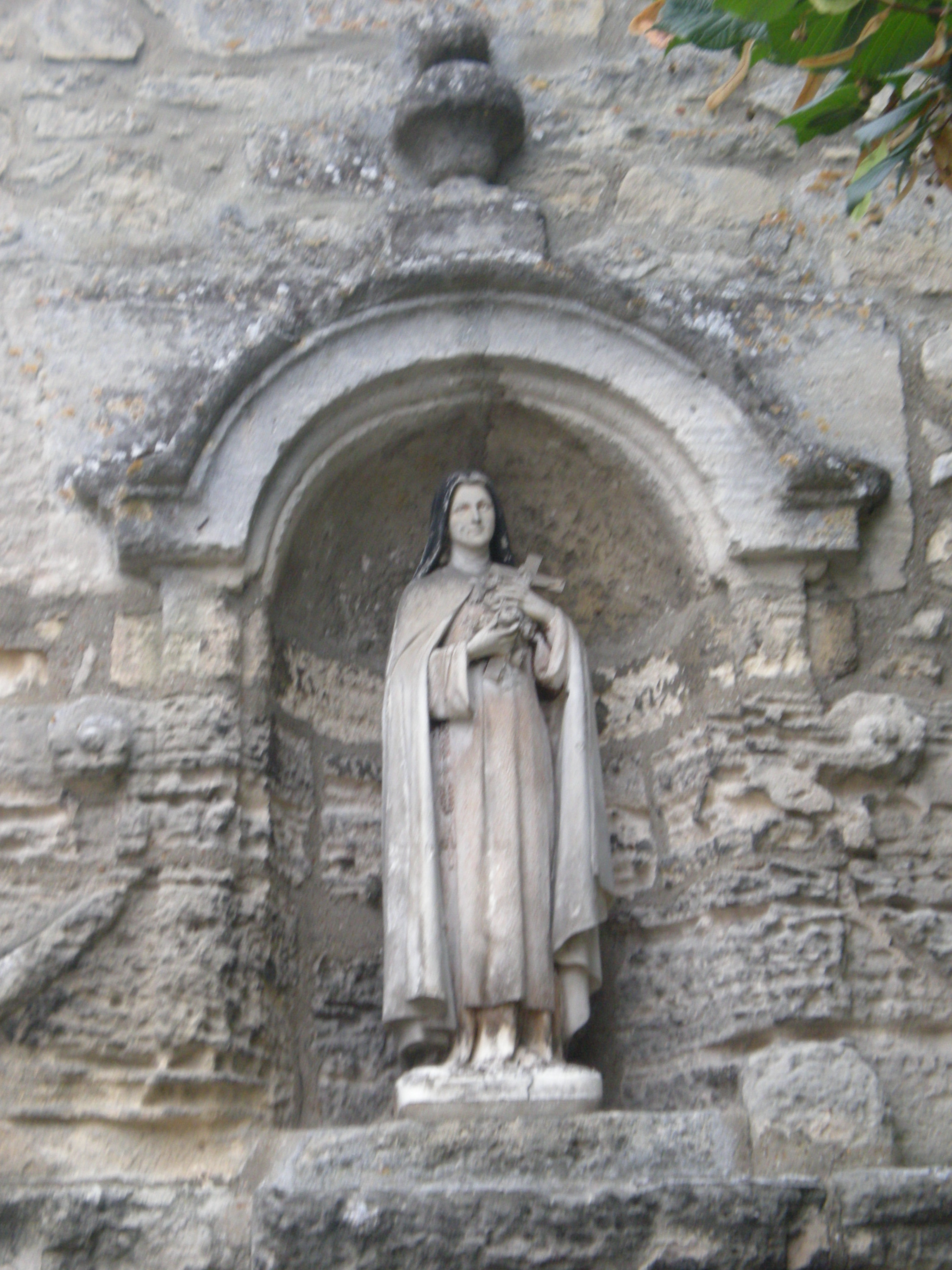 Statue de sainte-Thérèse à la chapelle des lardières